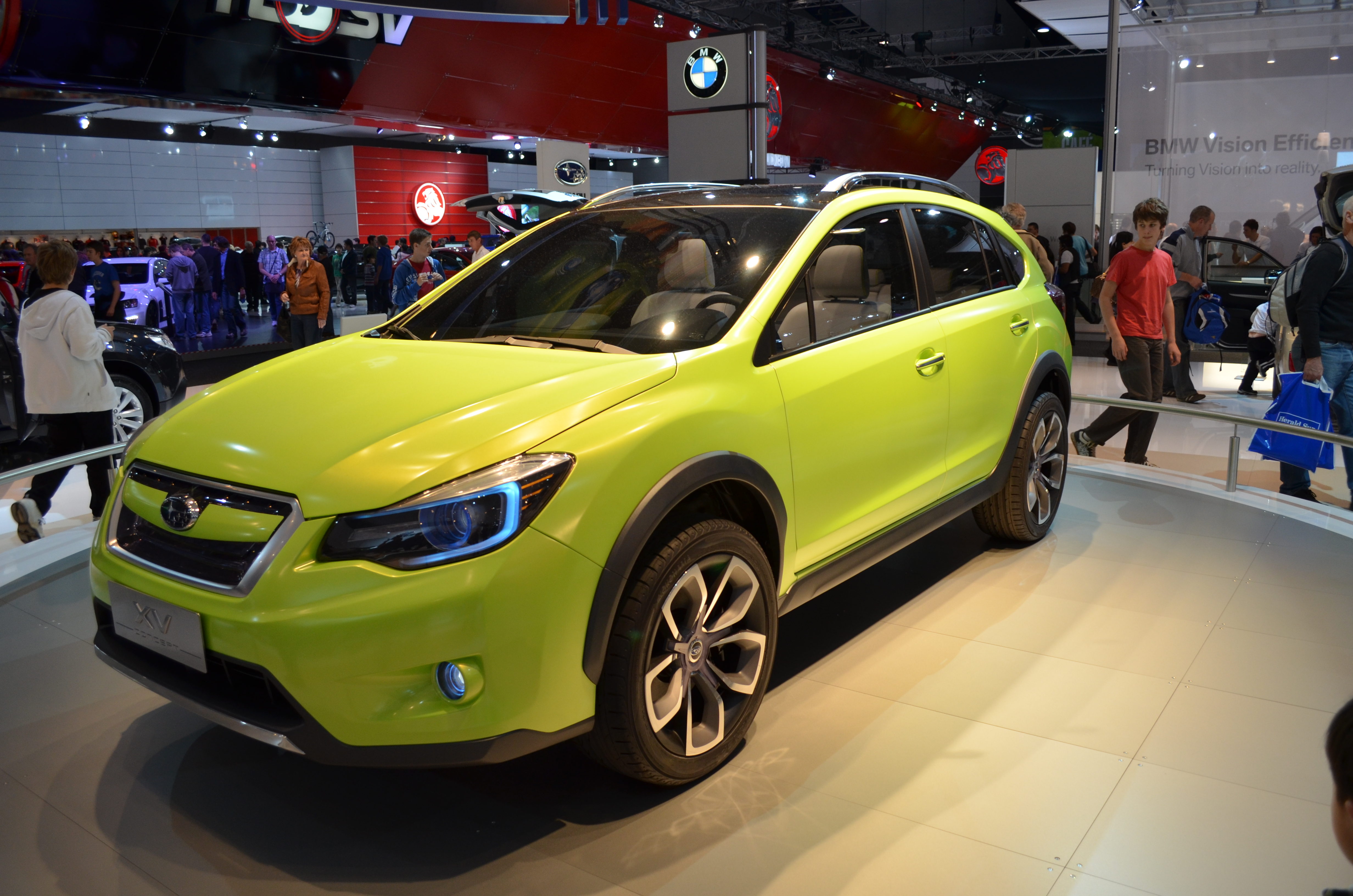 20110709_D5100 (285)